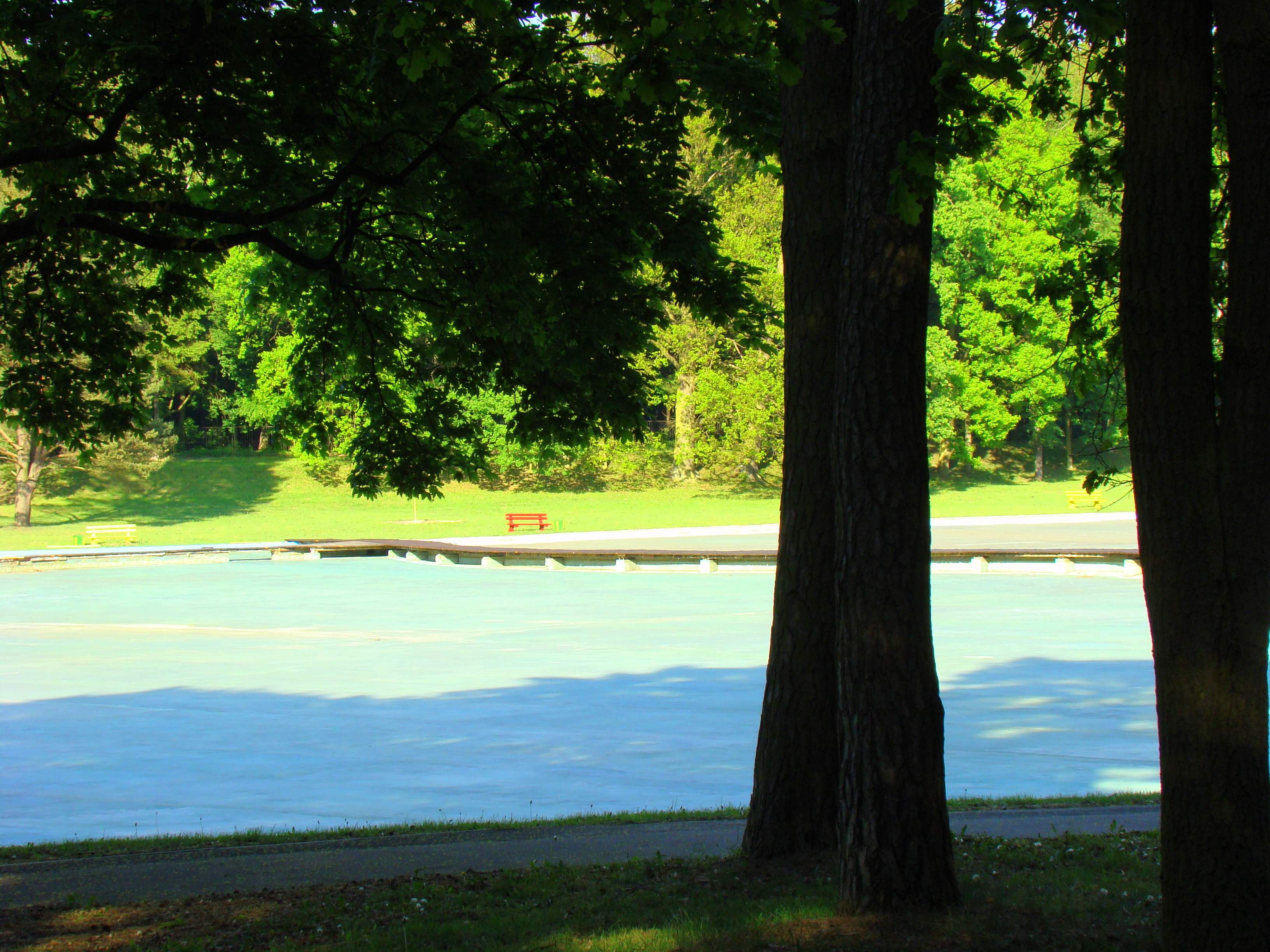 Arkonka (kąpielisko), Szczecin, Polska